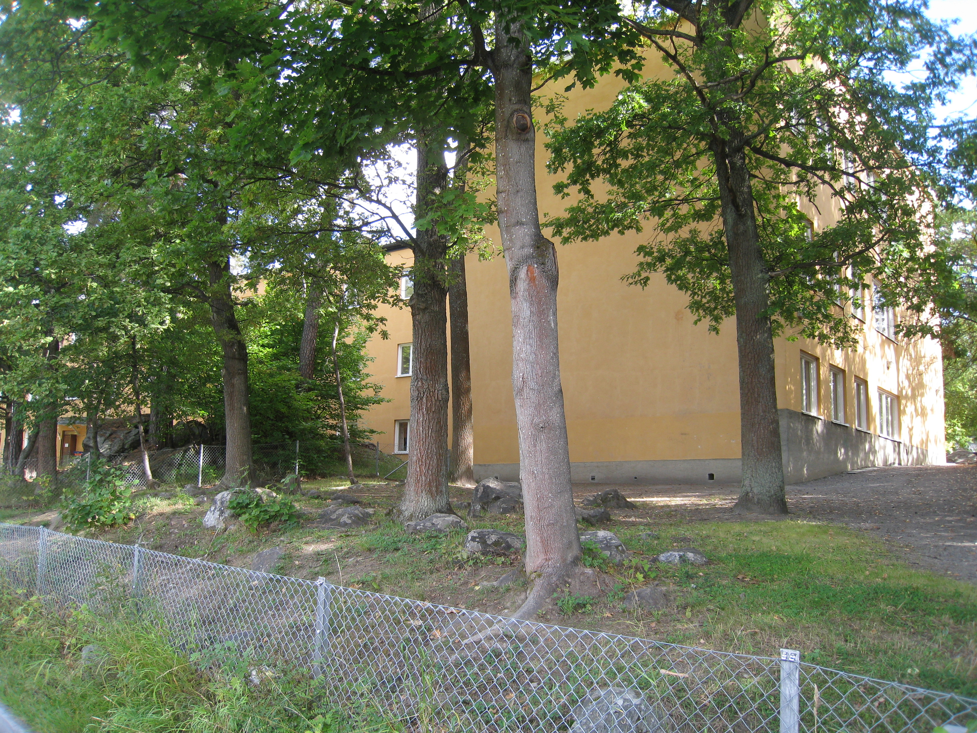 Olovslundsskolan i Olovslund, Bromma. Vy från Åkerslundsgatan. Skolan ligger på Gustav III:s väg 59-61, Olovslundsvägen 23 och Åkerslundsgatan 3 i Olovslund.